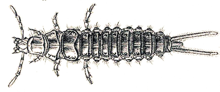 larva of Panagaeus cruxmajor